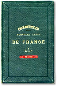 Description: La carte d'État-Major de 1866, telle qu'elle se présente pliée, couverture fermée. Ici: Secteur de Montpellier, Hérault, France. (Carte originale scannée) Source: Hugo SoriaLicence: GFDL Hugo Soria